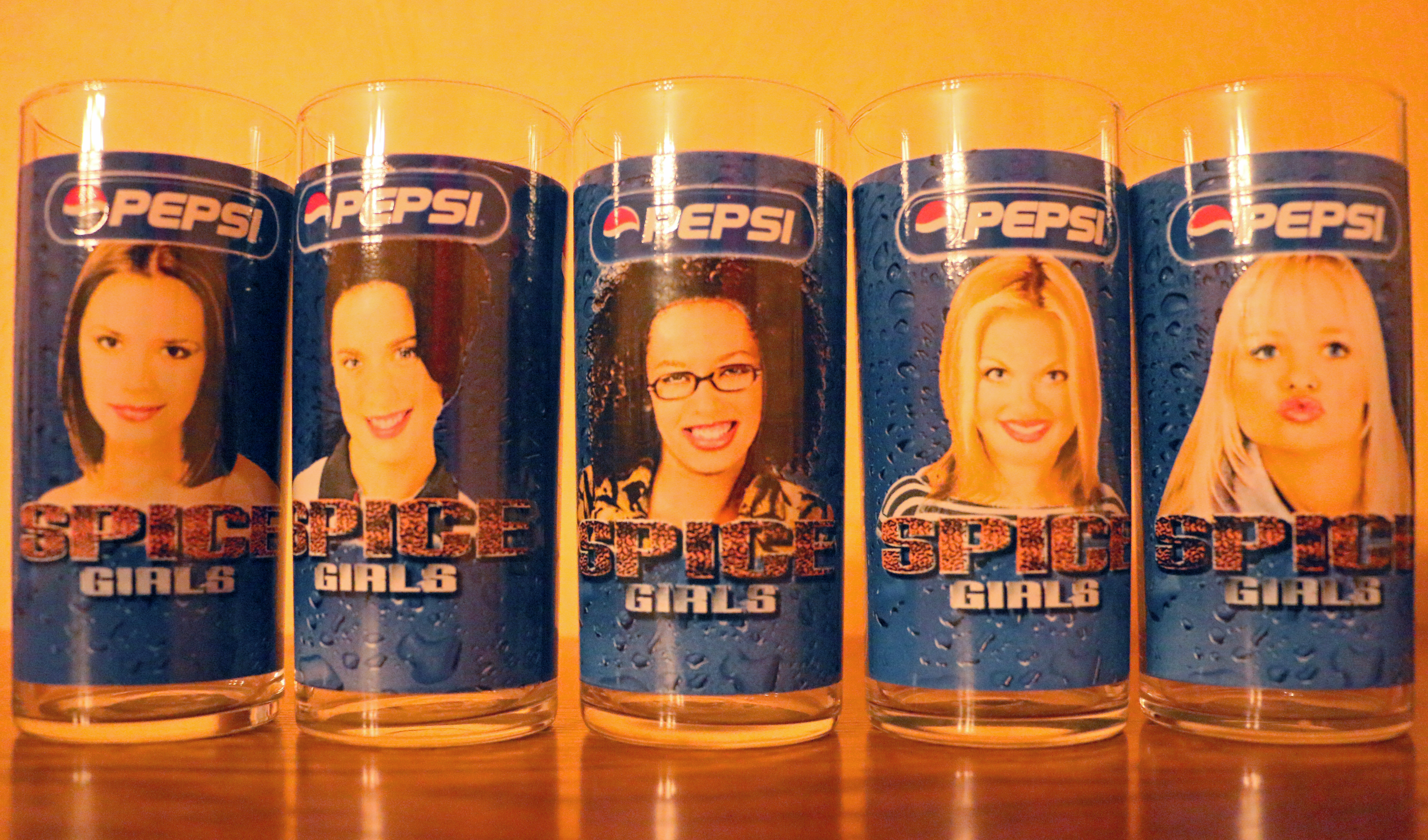 Verre pepsi spice girls